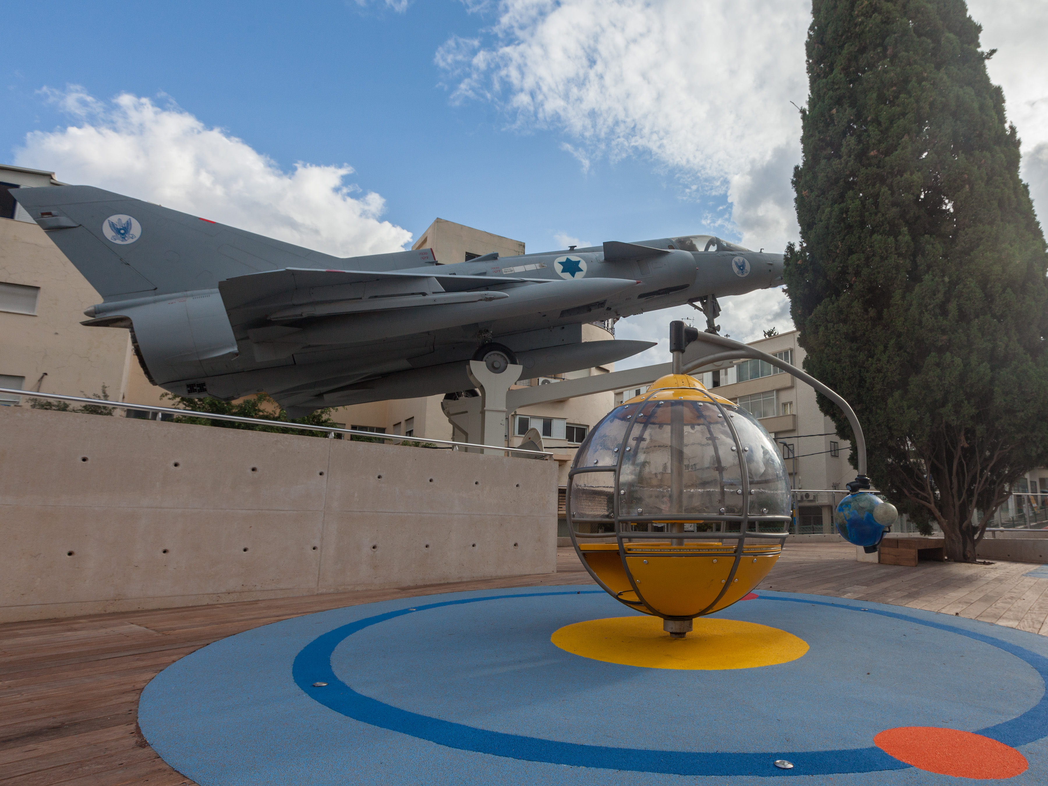 מטוס הכפיר במקומו החדש לאחר הקמת פארק המדע